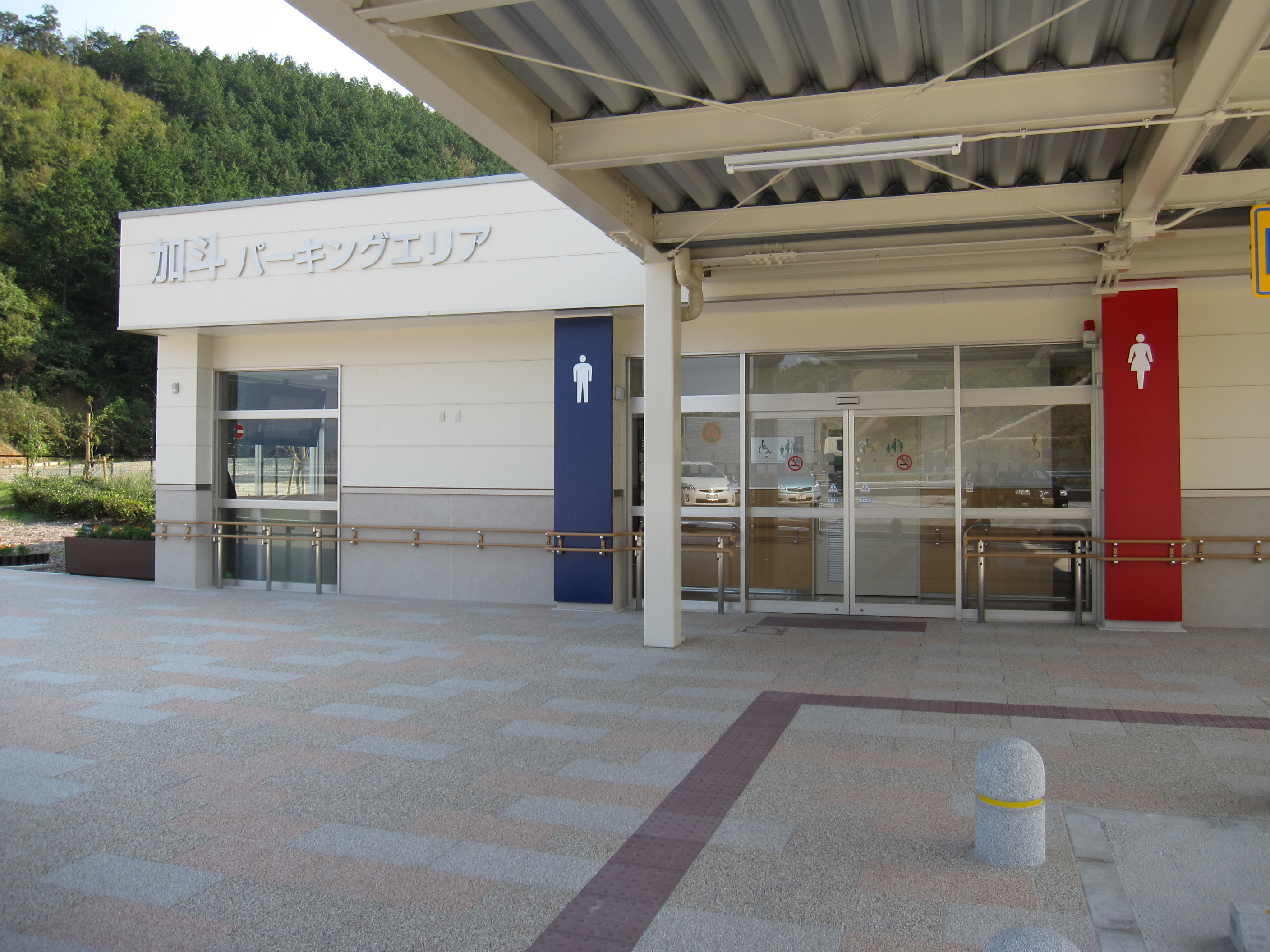 加斗パーキングエリア上り線側施設